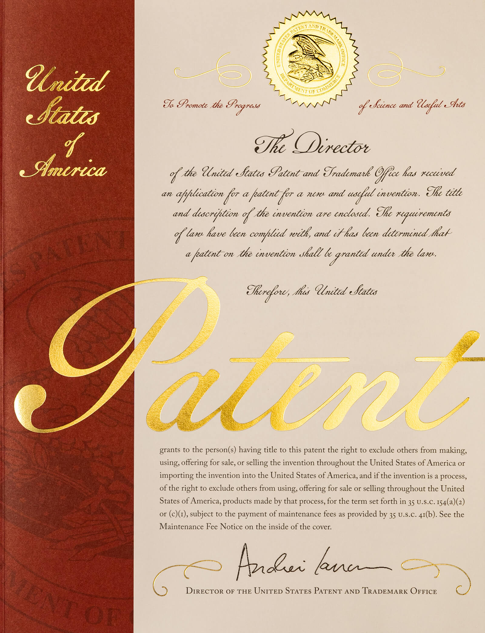 US-Patentabdeckung (2018-)